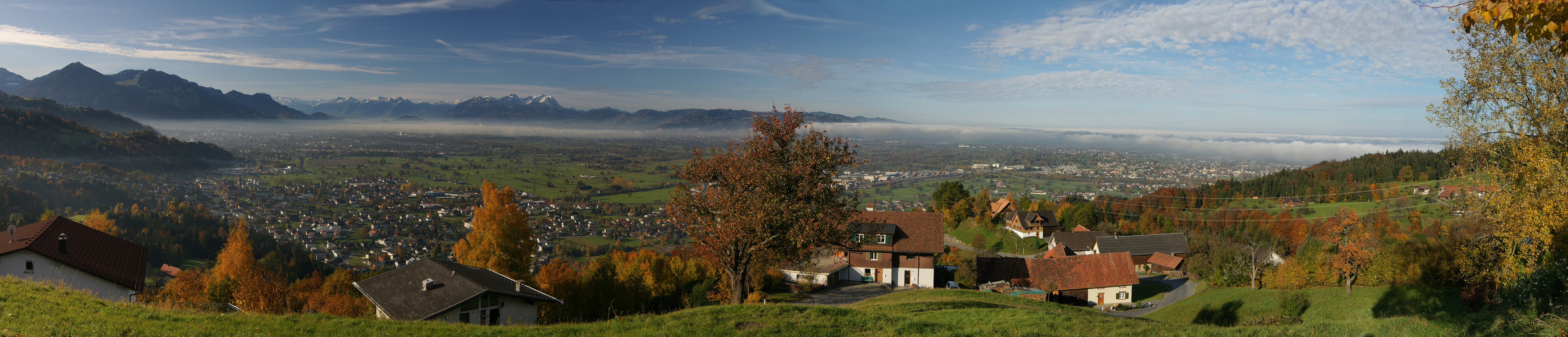 Panorama von Bildstein, oberhalb von Wolfurt, über das Rheintal auf die Schweizer Gebirgszüge mit der Alvierkette , dem Gamser-und dem Chäserrugg, dem Alpsteingebirge mit dem Säntis, Altmann und Hoher Kasten im Kanton St. Gallen. Über den Bodensee schiebt sich talwärts eine Nebelbank.